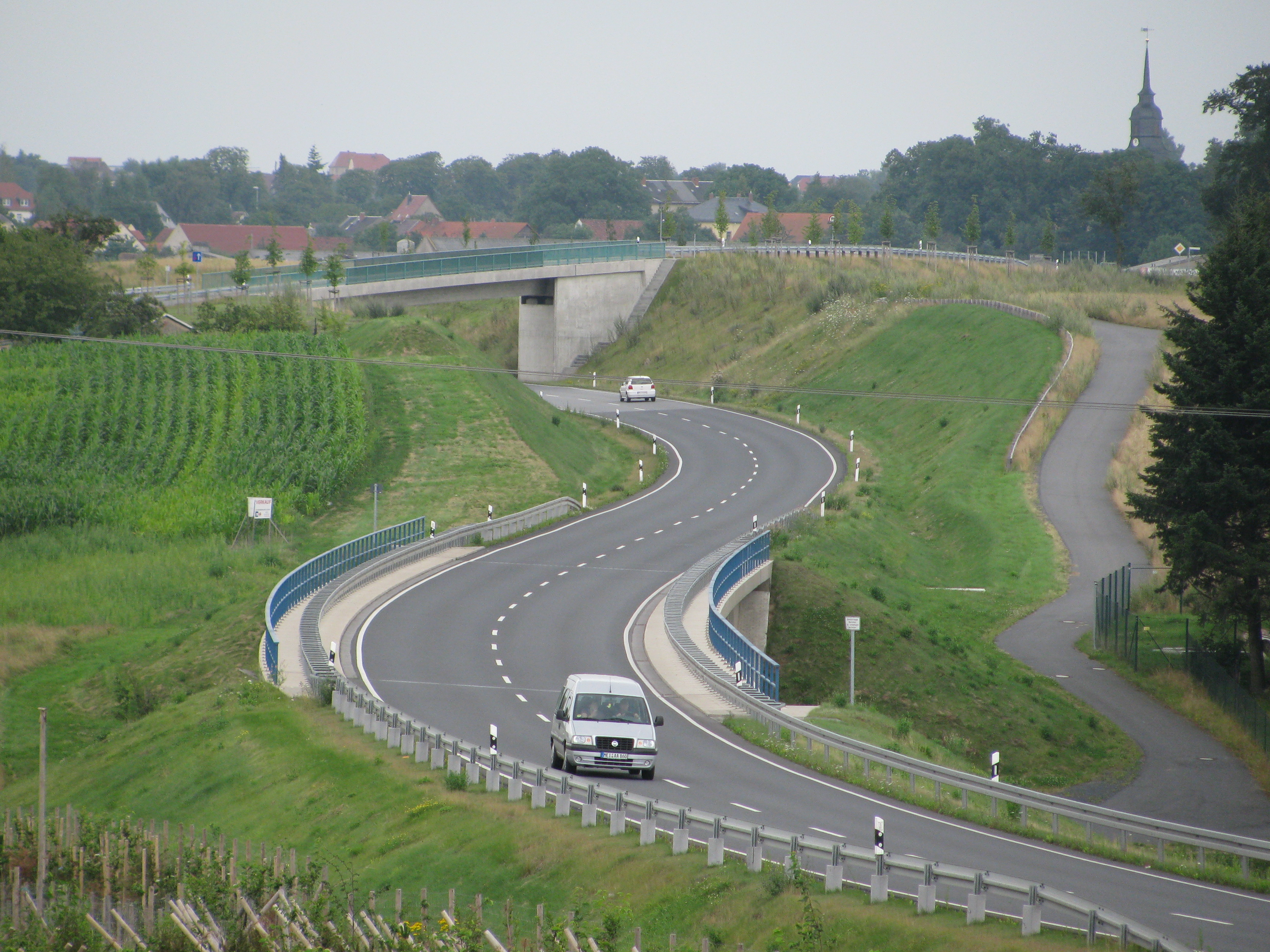 Neubaustrecke der Staatsstraße S81 in Friedewald, im Hintergrund Reichenberg, Gemeinde Moritzburg, Sachsen